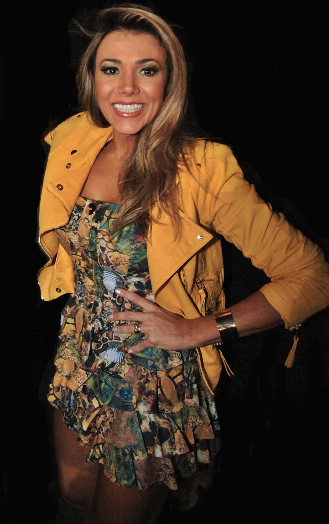 Fabiana Teixeira do Big Brother Brasil 12 (BBB12) no Arraia do Cerveja & Cia de 2012.